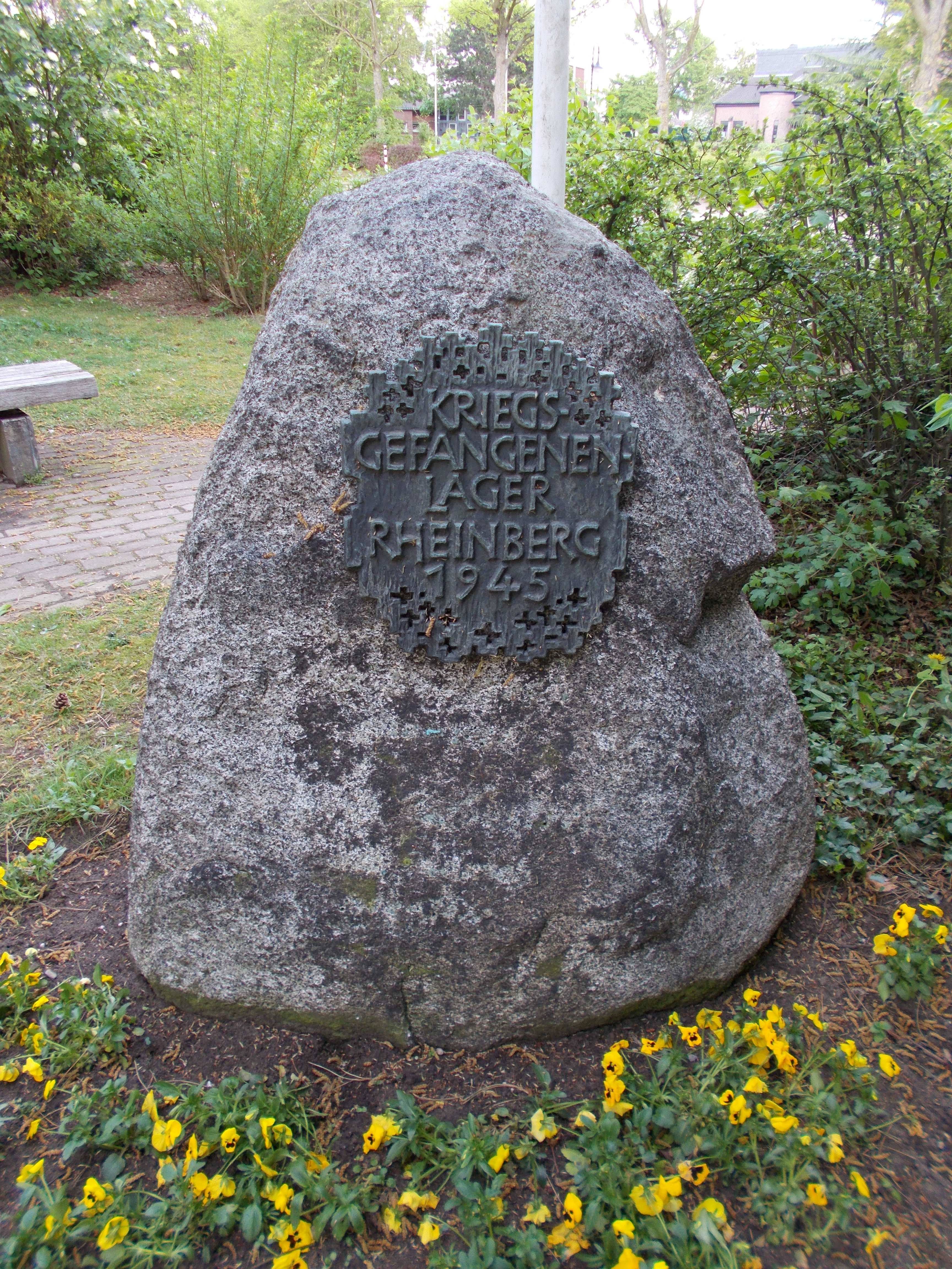 Gedenkstein "Kriegsgefangenenlager Rheinberg 1945" vor der Katholische Kirchengemeinde St. Anna.